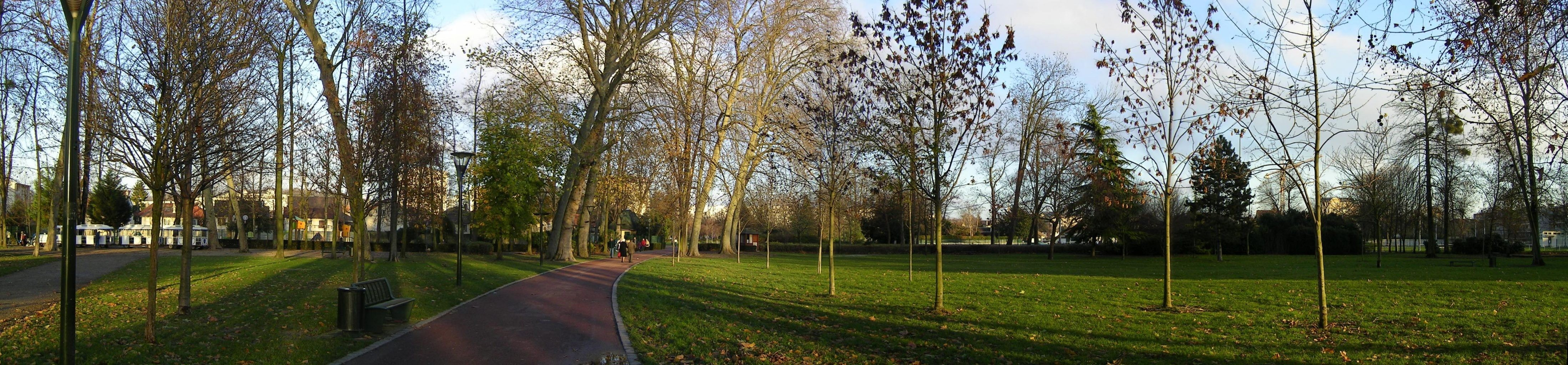 Parc Emile Fouchard situé dans le centre-ville Photo personnelle (own work) de Marianna